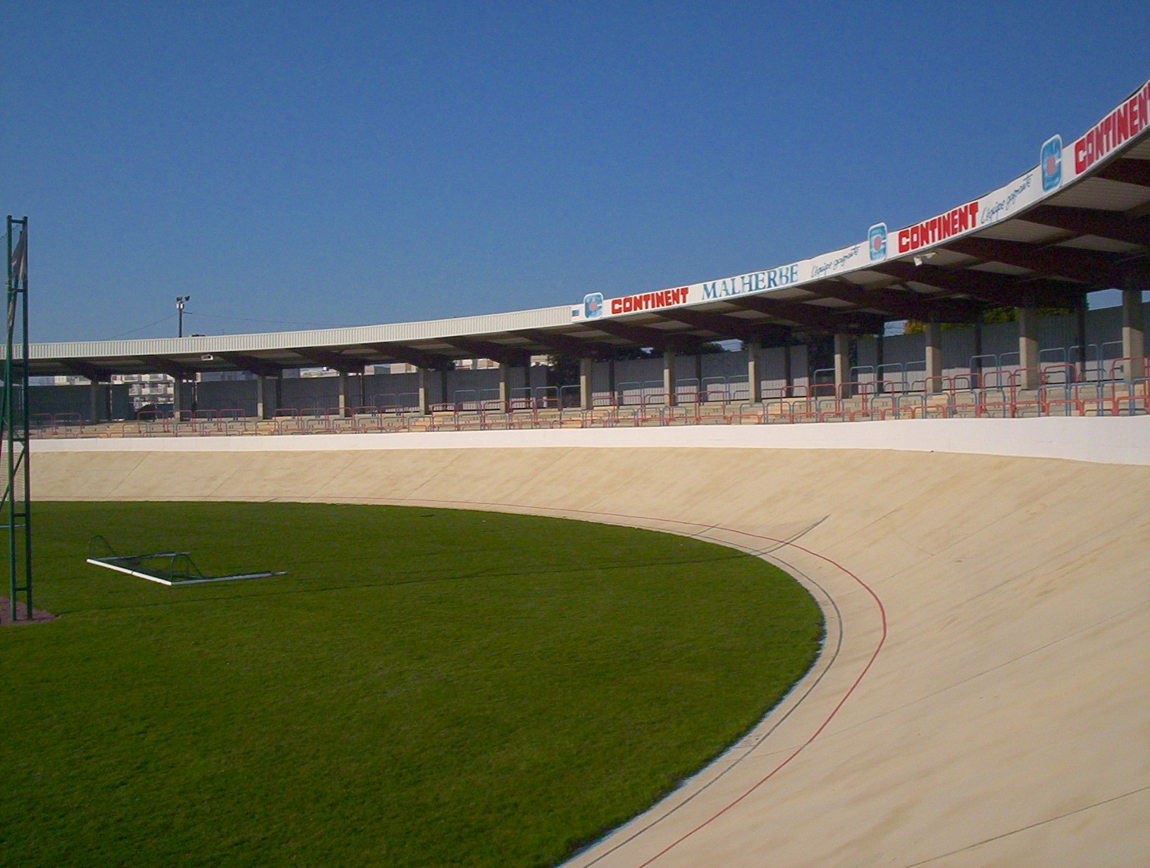 inside Stade de Venoix